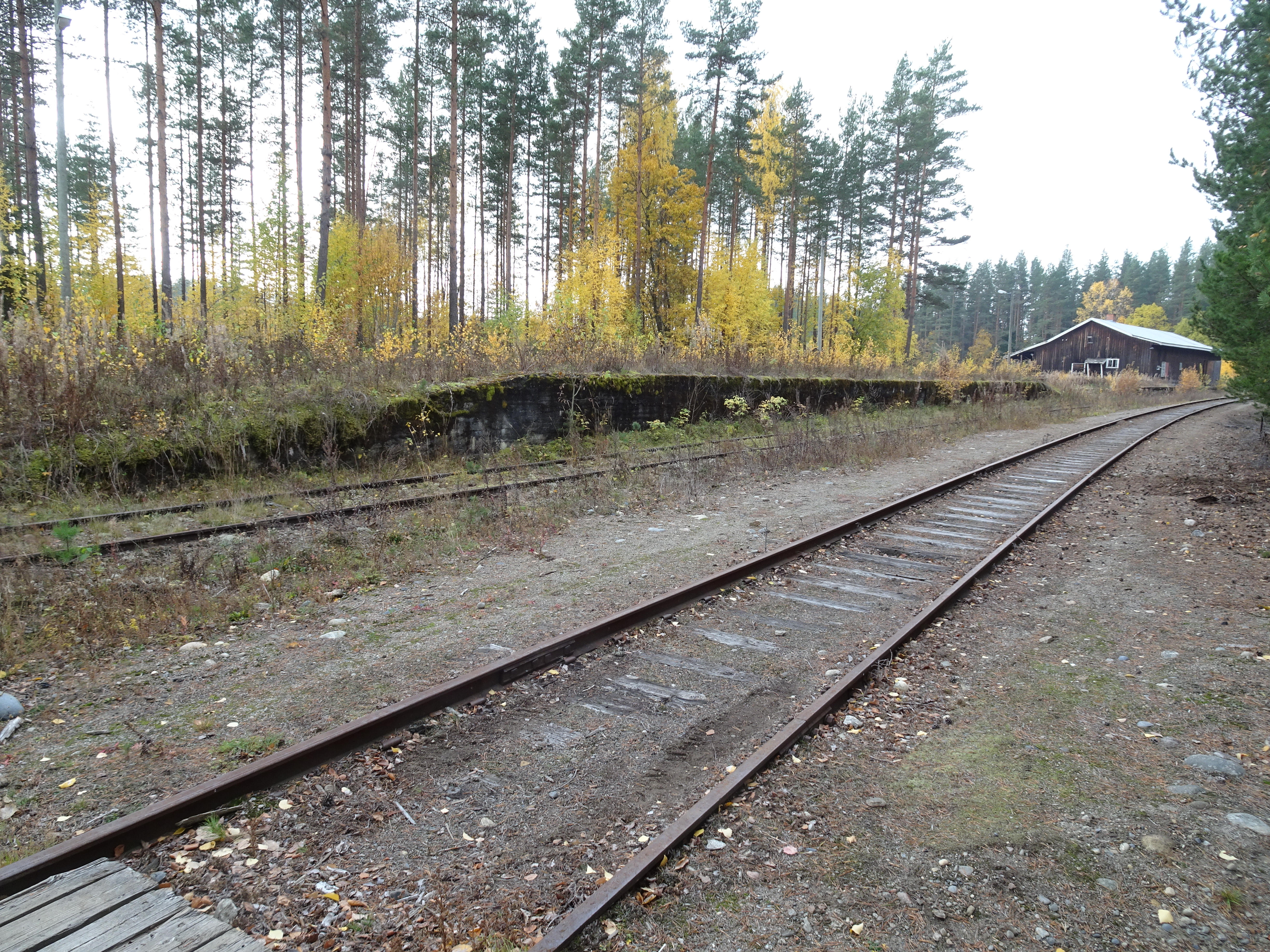 Eggemoen holdeplass på Randsfjordbanen